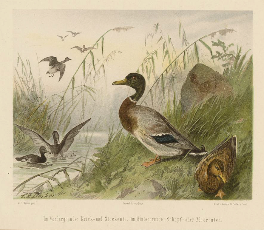 Chromolithographie aus der Serie „Jagdbare Thiere“ von Carl Friedrich Deiker, Im Vordergrunde: Krick- und Stockente, im Hintergrunde: Schopf- oder Moorenten.